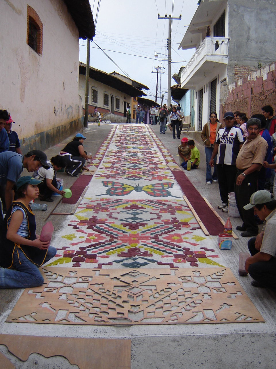 Ejemplo de alfombra de aserrin realizada para la procesion del Sr. del Colateral, la cual se realiza el 11 de mayo de cada año en Acaxochitlán, Hidalgo, México.